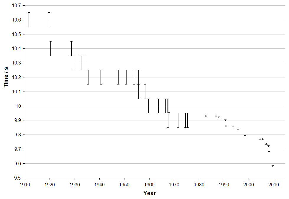 By ed g2s • talk.